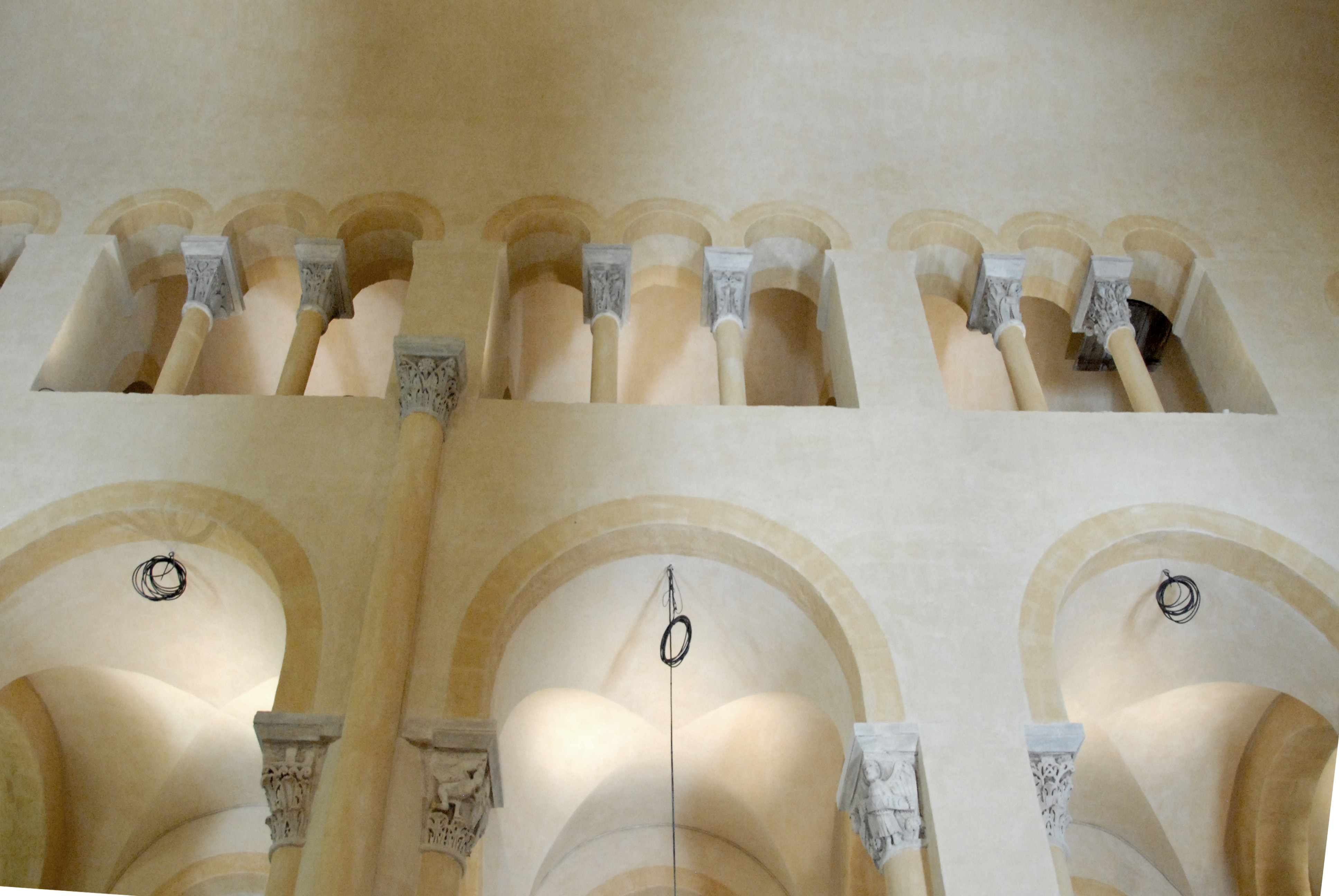 Notre-Dame du Port, Nordwand Mittelschiff